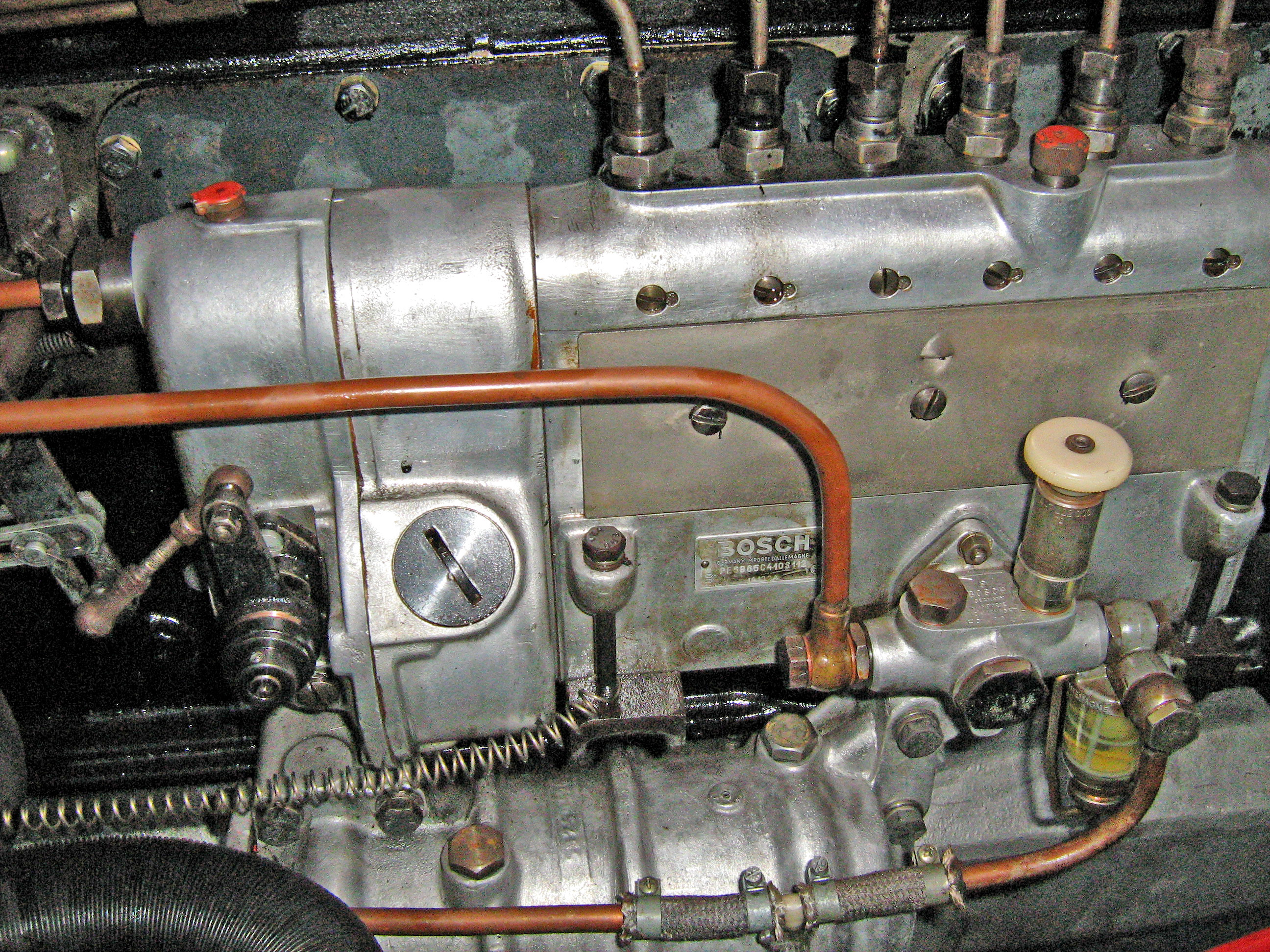 Bosch Einspritzpumpe von 1938 (Daimler-Benz 6-Zylinder-Motor mit 90 PS bei 1700 U/min)